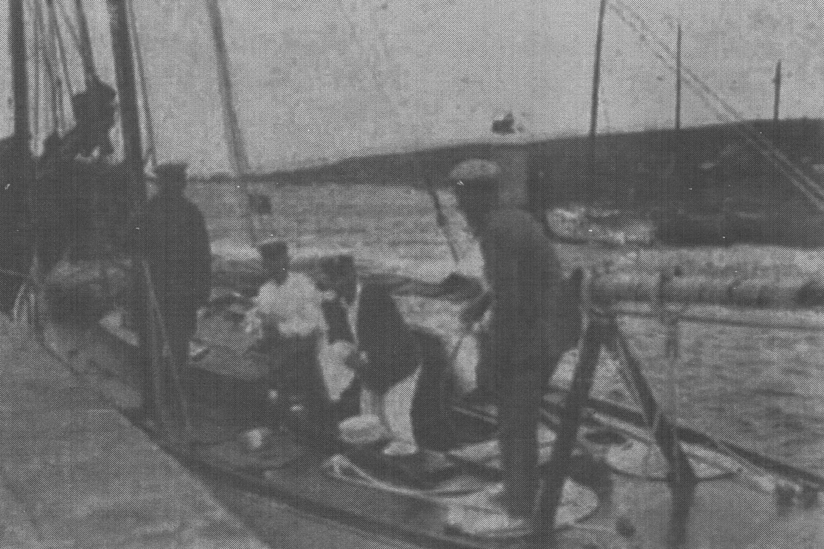 SY Witeź w porcie na wyspie Han-ö